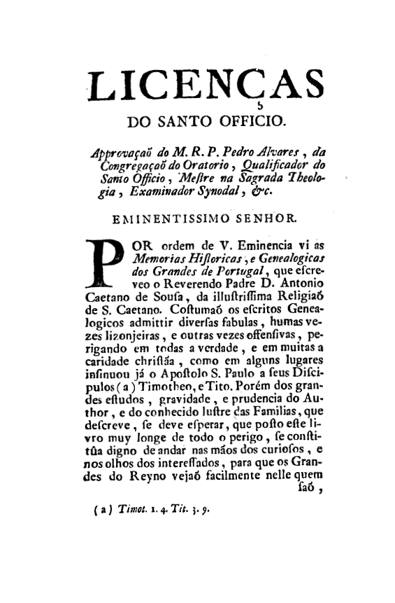 Memorias Historicas e Genealogicas dos Grandes de Portugal - Licenças do Santo Officio